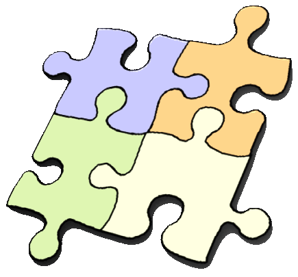 a drawing of a 4 piece jigsaw puzzle